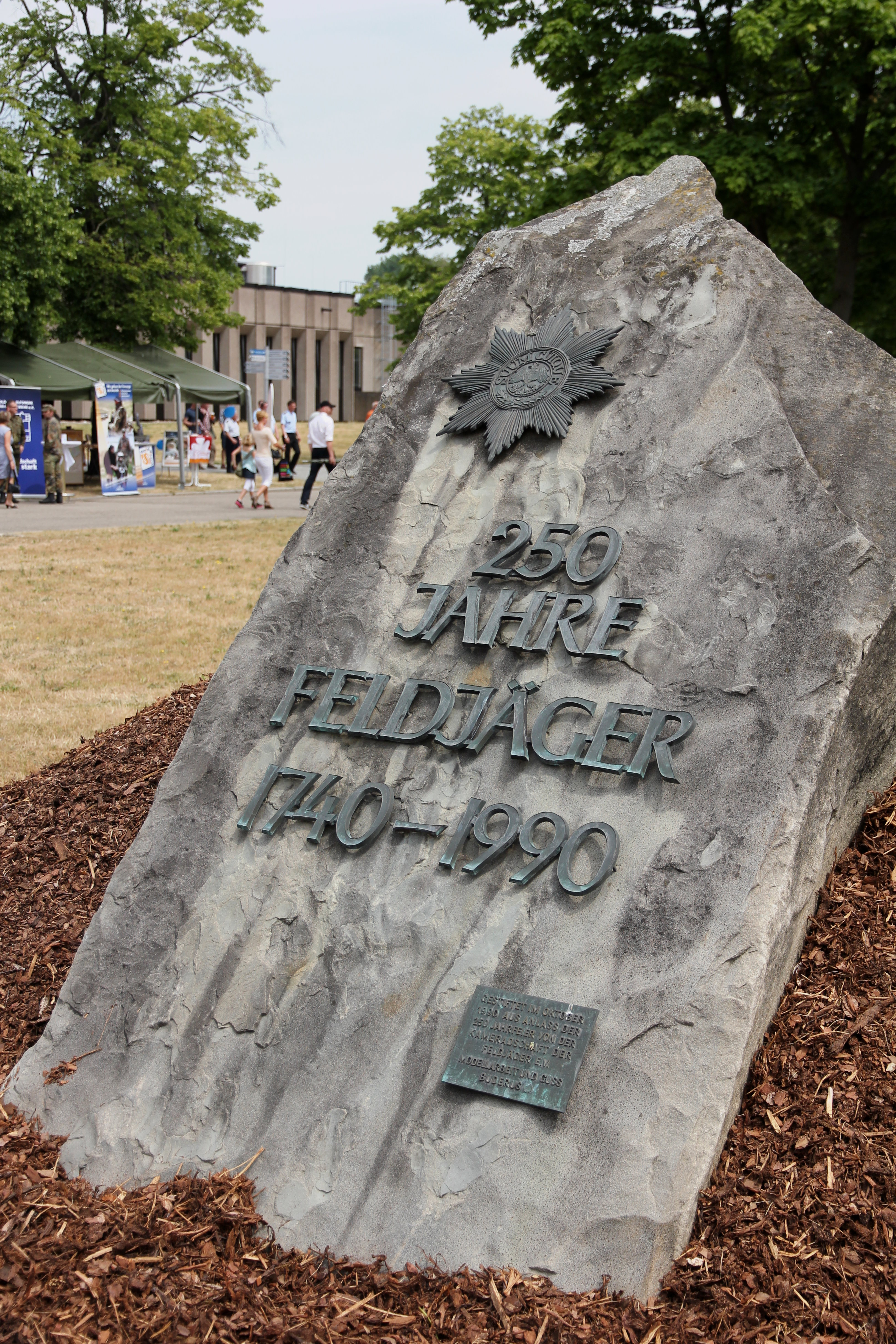 Gedenkstein auf dem Gelände der Emmich-Cambrai-Kaserne in Hannover Inschrift: SUUM CUIQUE 250 JAHRE FELDJÄGER 1740-1990 GESTIFTET IM OKTOBER 1990 AUS ANLASS DER 250 JAHRFEIER VON DER KAMERADSCHAFT DER FELDJÄGER E.V. MODELLARBEIT UND GUSS BUDERUS